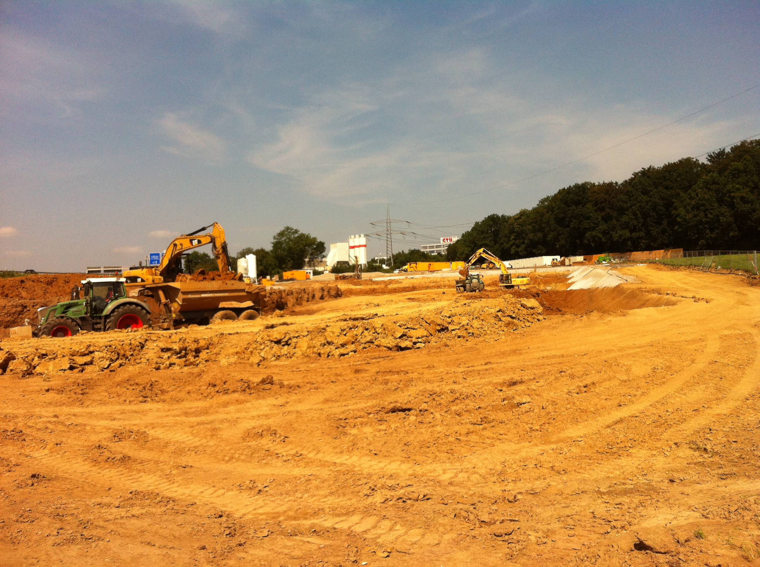 Arbeiten an der südlichen Startbaugrube für den Fildertunnel beim Projekt Stuttgart 21